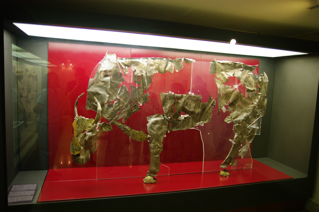 Museum Delphi, Stier